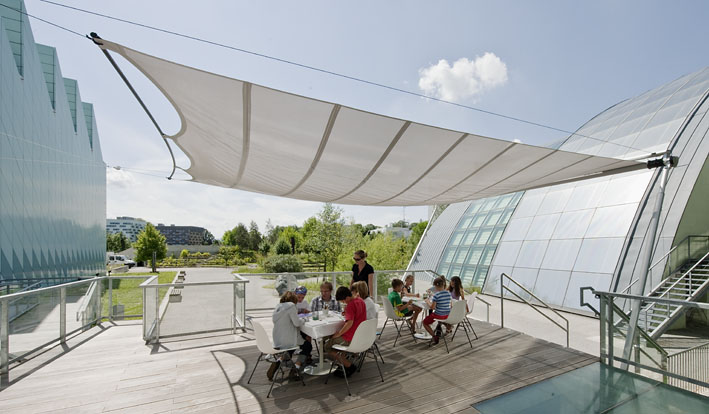 Landesmuseum Niederösterreich, Garten